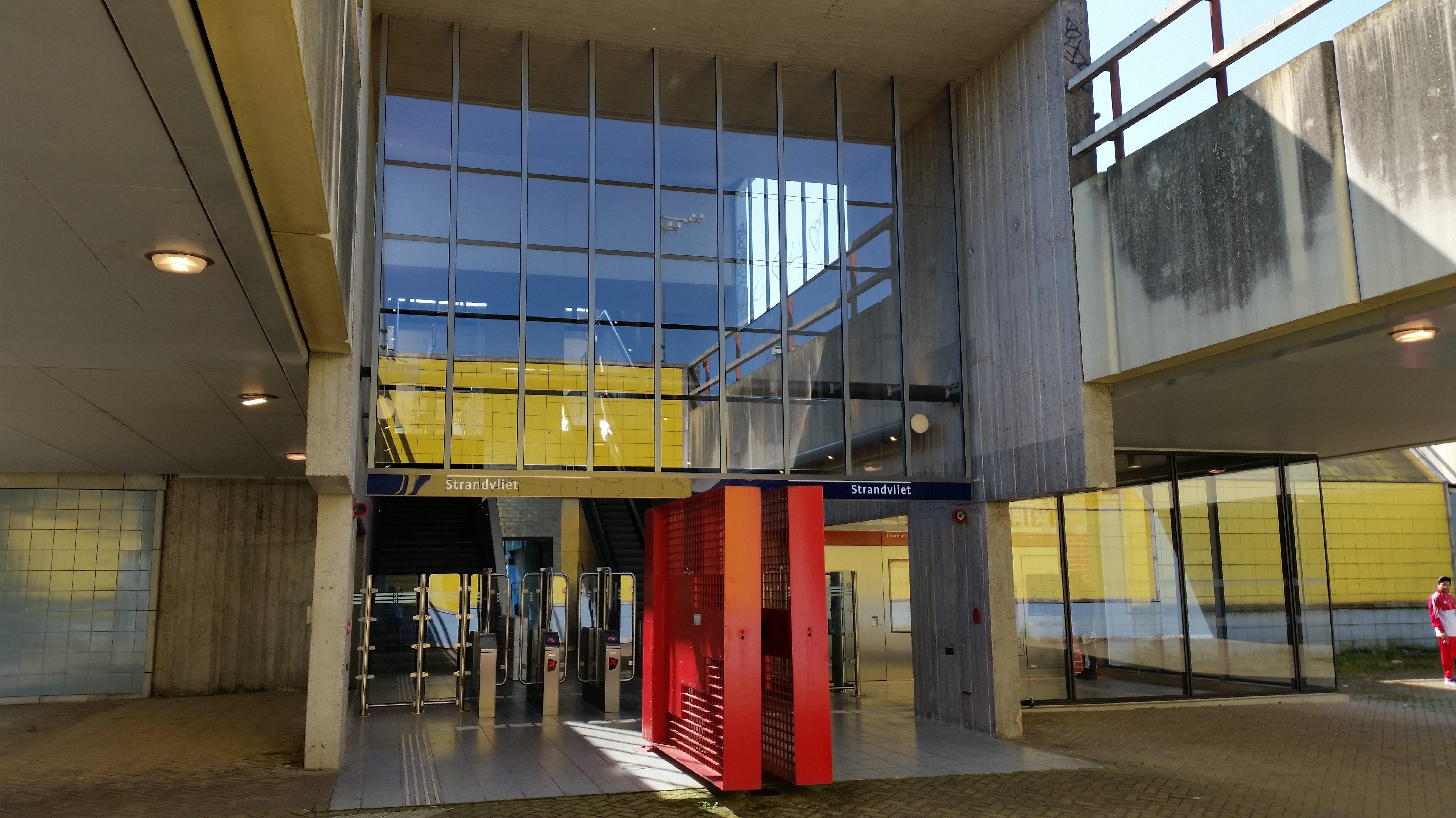 Impressie van de Boris Pasternakmetrobruggen van metrostation Strandvliet.